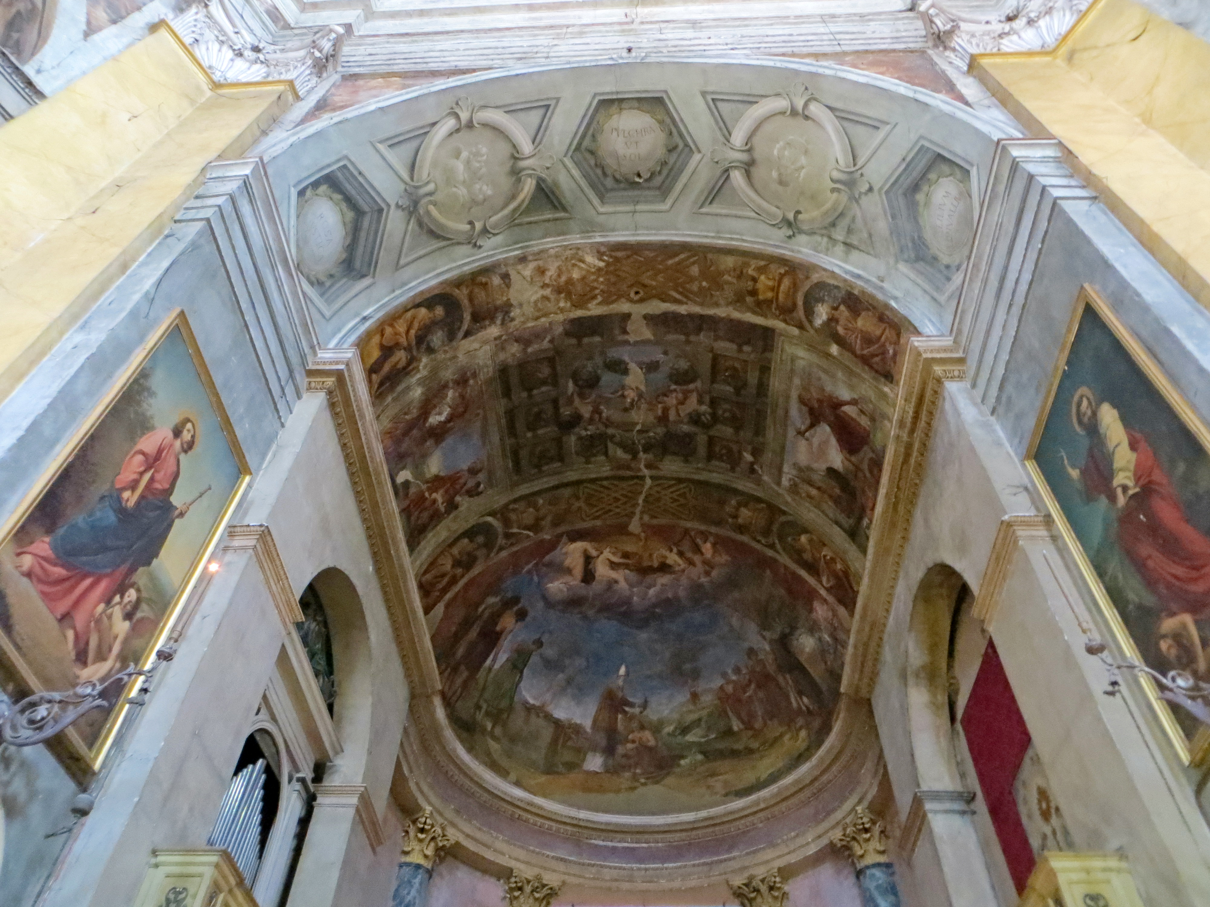 Chiesa di Santa Maria del Quartiere (Parma) - volta del presbiterio